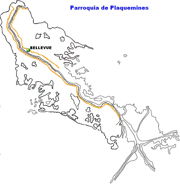 Bellevue, Louisiana.